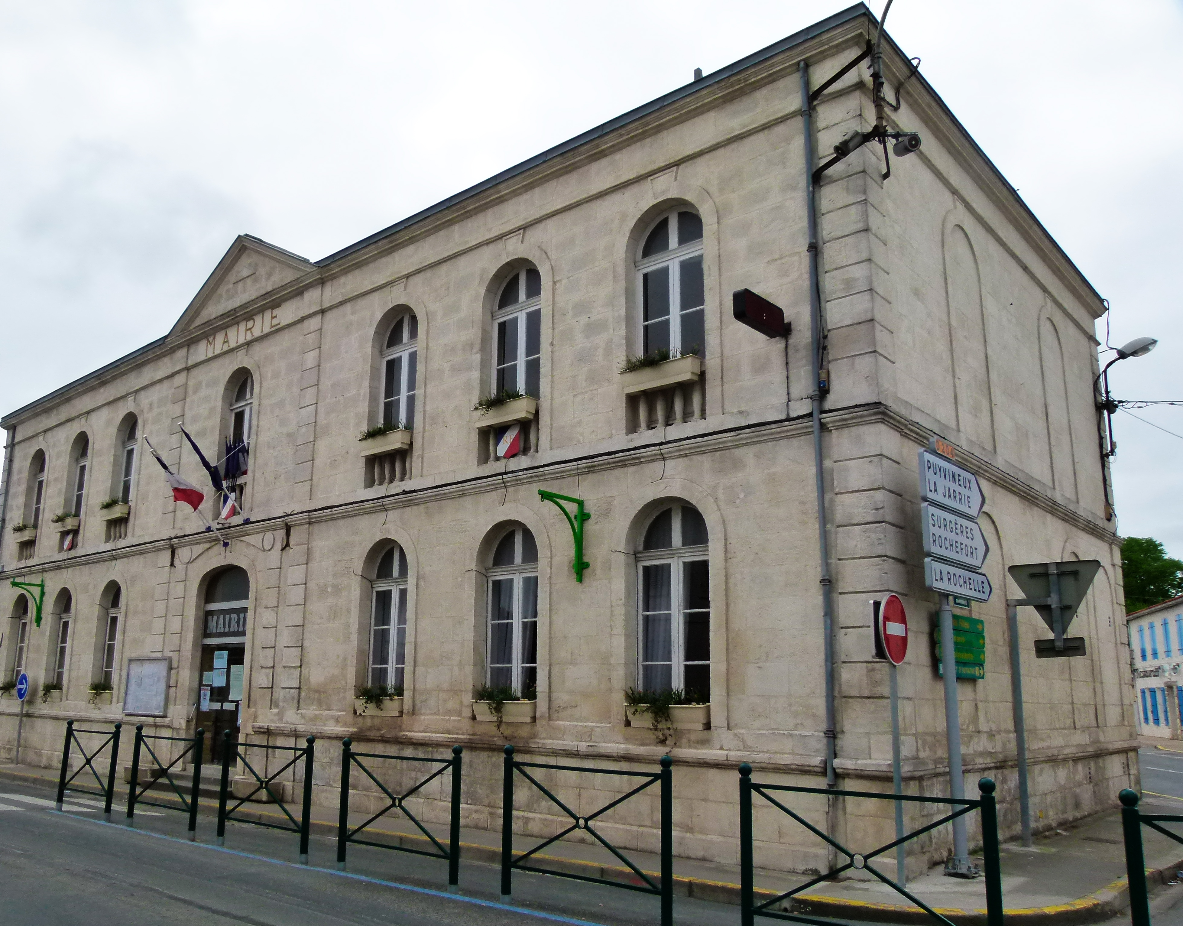 La mairie d'Aigrefeuille (17) vue depuis la place de la République à l'angle de la rue de l'Aunis et de la rue des Marronniers.